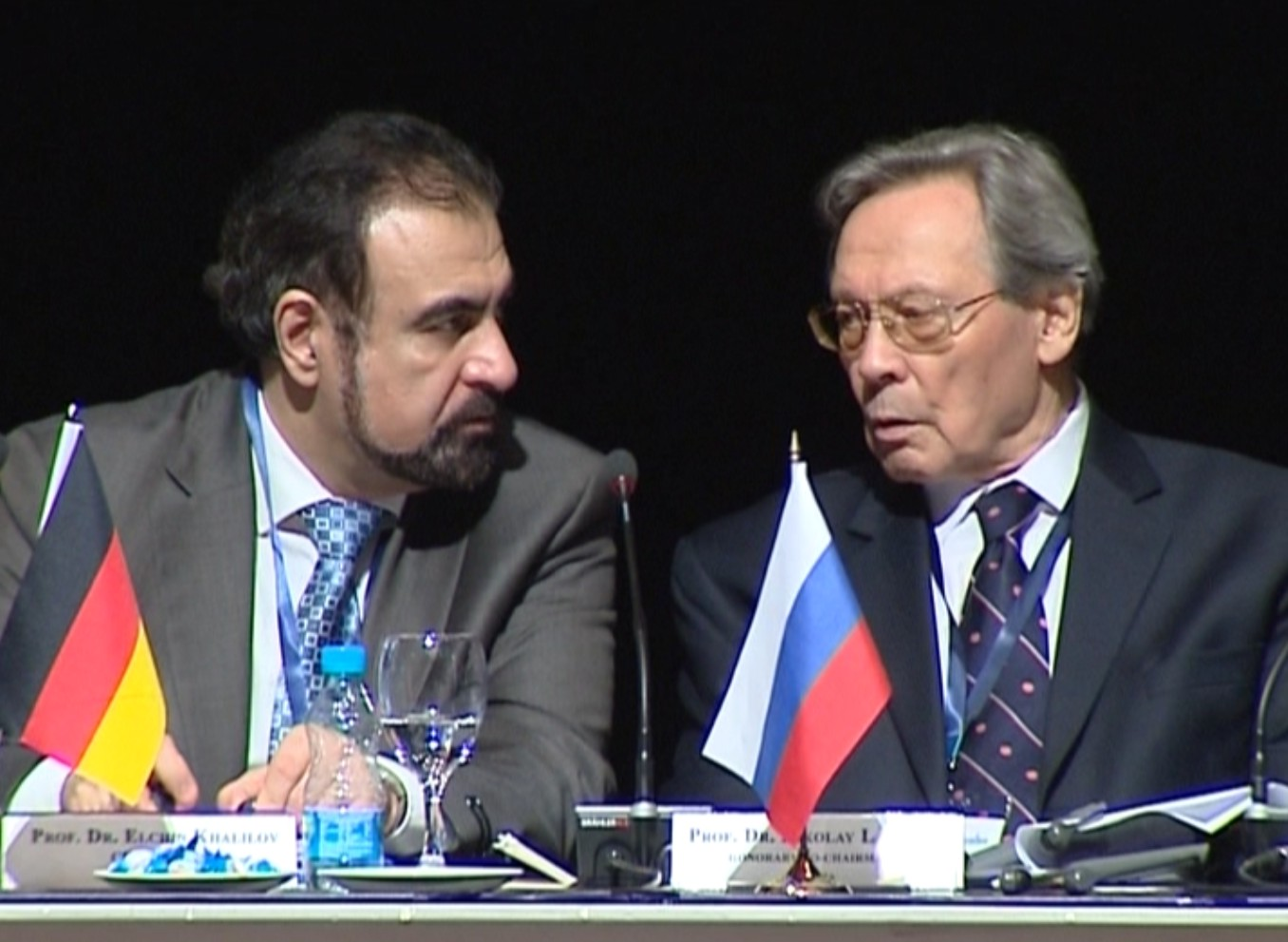 19-21 сентября 2011 года в г. Стамбуле (Турции) Международный Конгресс на тему: «Природные катаклизмы и глобальные проблемы современной цивилизации» - GEOCATACLYSM-2011» президент Глобальной сети по прогнозированию землетрясений, доктор геолого-минералогических наук, профессор. Эльчин Нусратович Халилов и Вице-президент Российской Академии Наук , академик РАН, доктор технических наук Николай Павлович Лавёров.